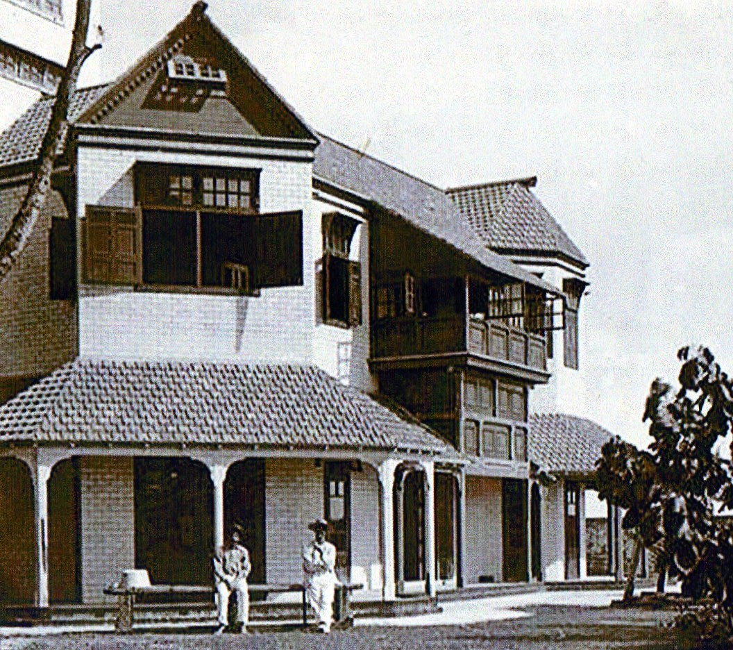 "Oceania House", residenza della famiglia Clunies-Ross, isole Cocos (Australia)